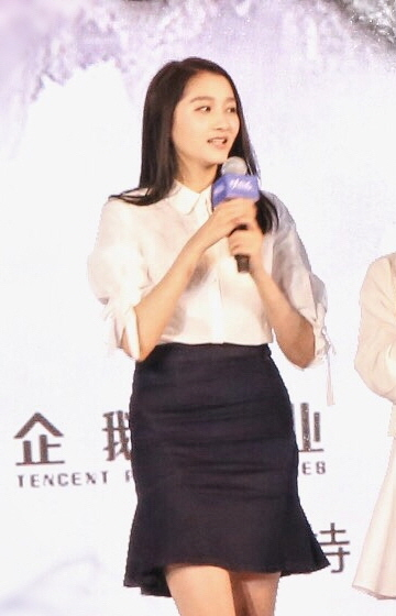 中文（中国大陆）: 甜甜甜 小鞠太太太太美 晓彤妹子也很漂亮！(关晓彤)